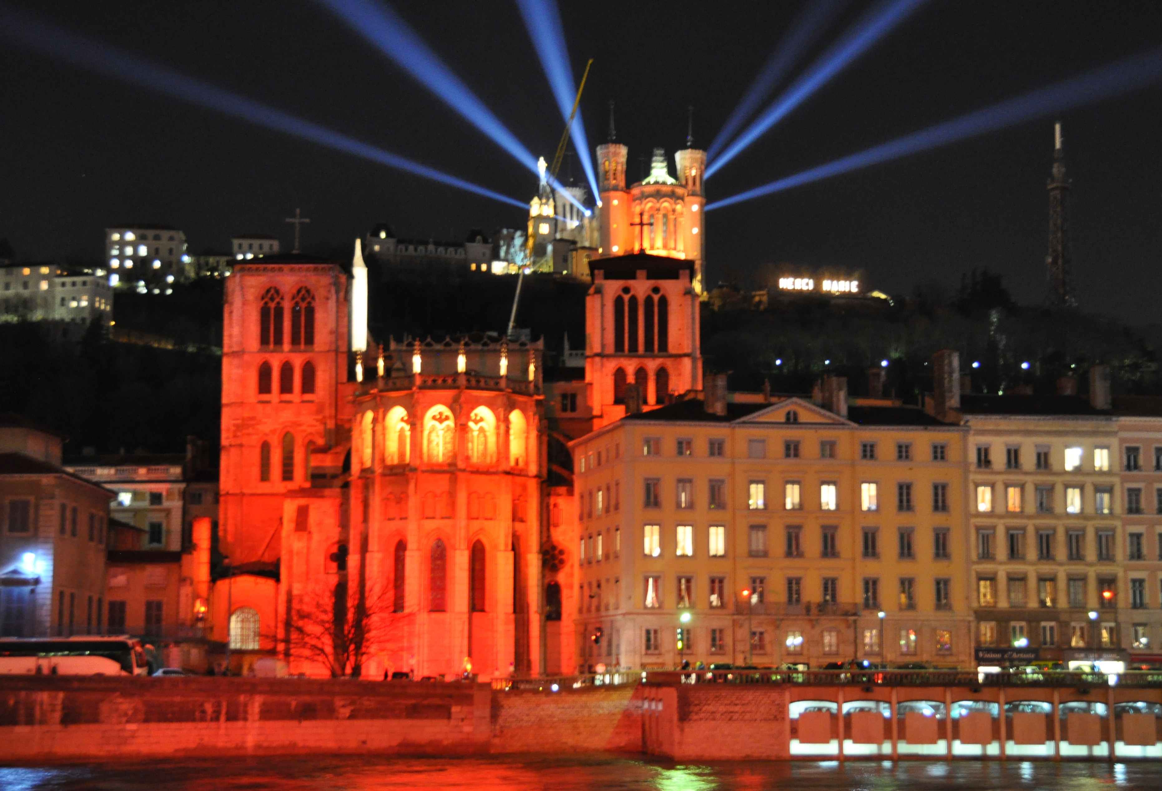 Fête des lumières. .